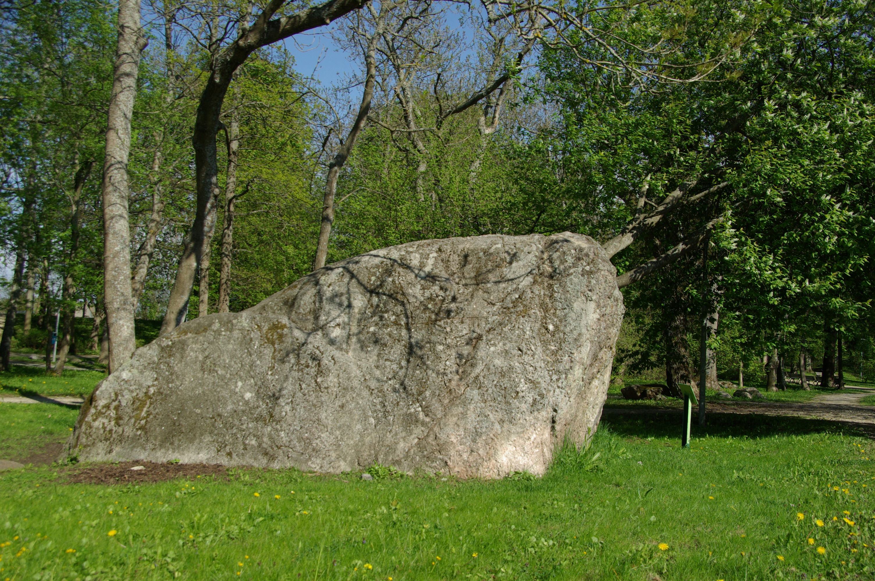 Väina tee kivi